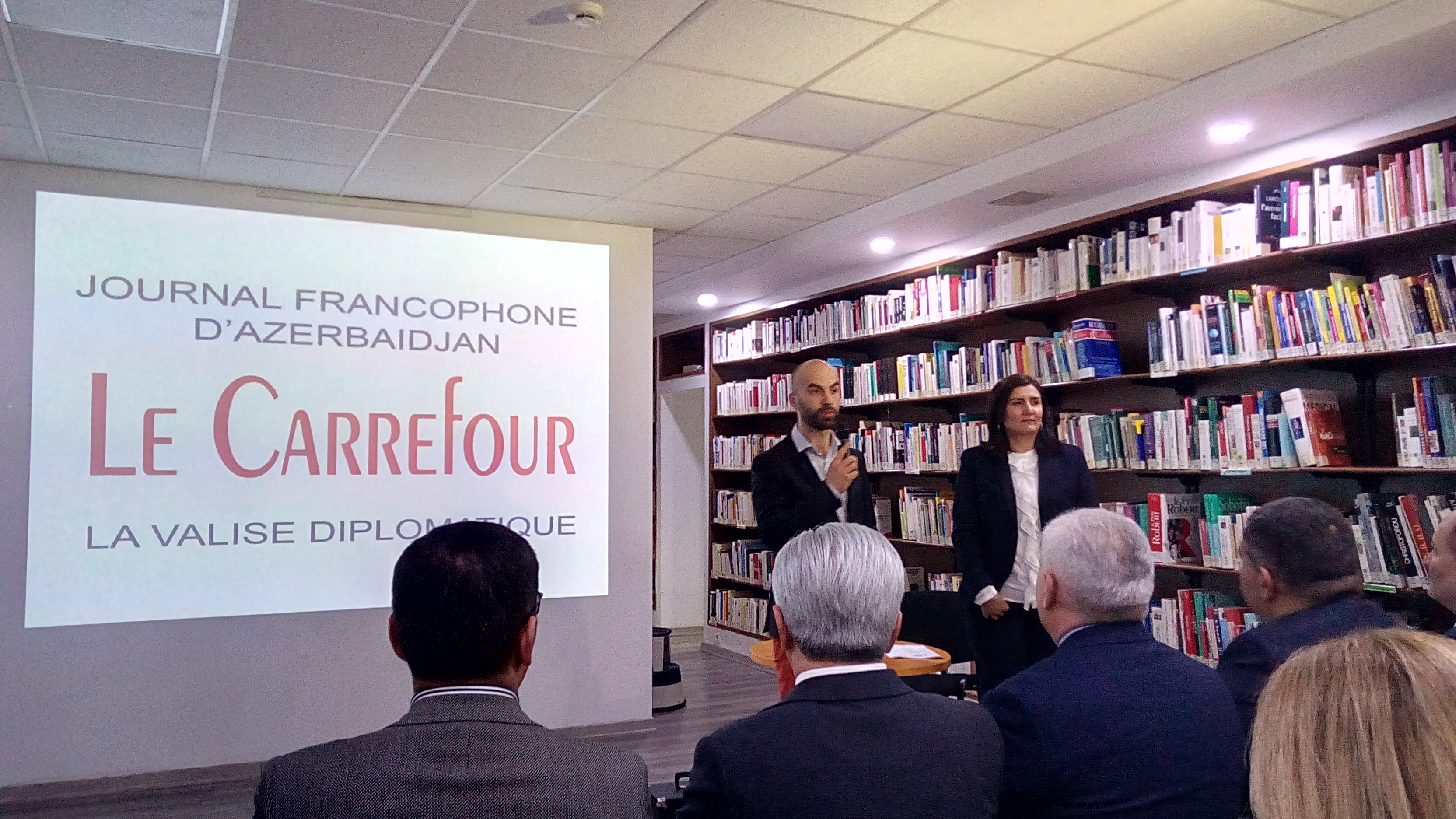 Azərbaycandakı Fransız İnstitutunda Le Carrefour qəzetinin təqdimatı